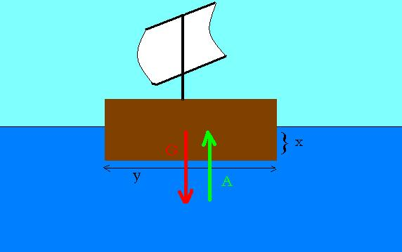 هذه الصورة من إنتاج المستخدم مبتدئ 05:15, 6 يناير 2006 (UTC)